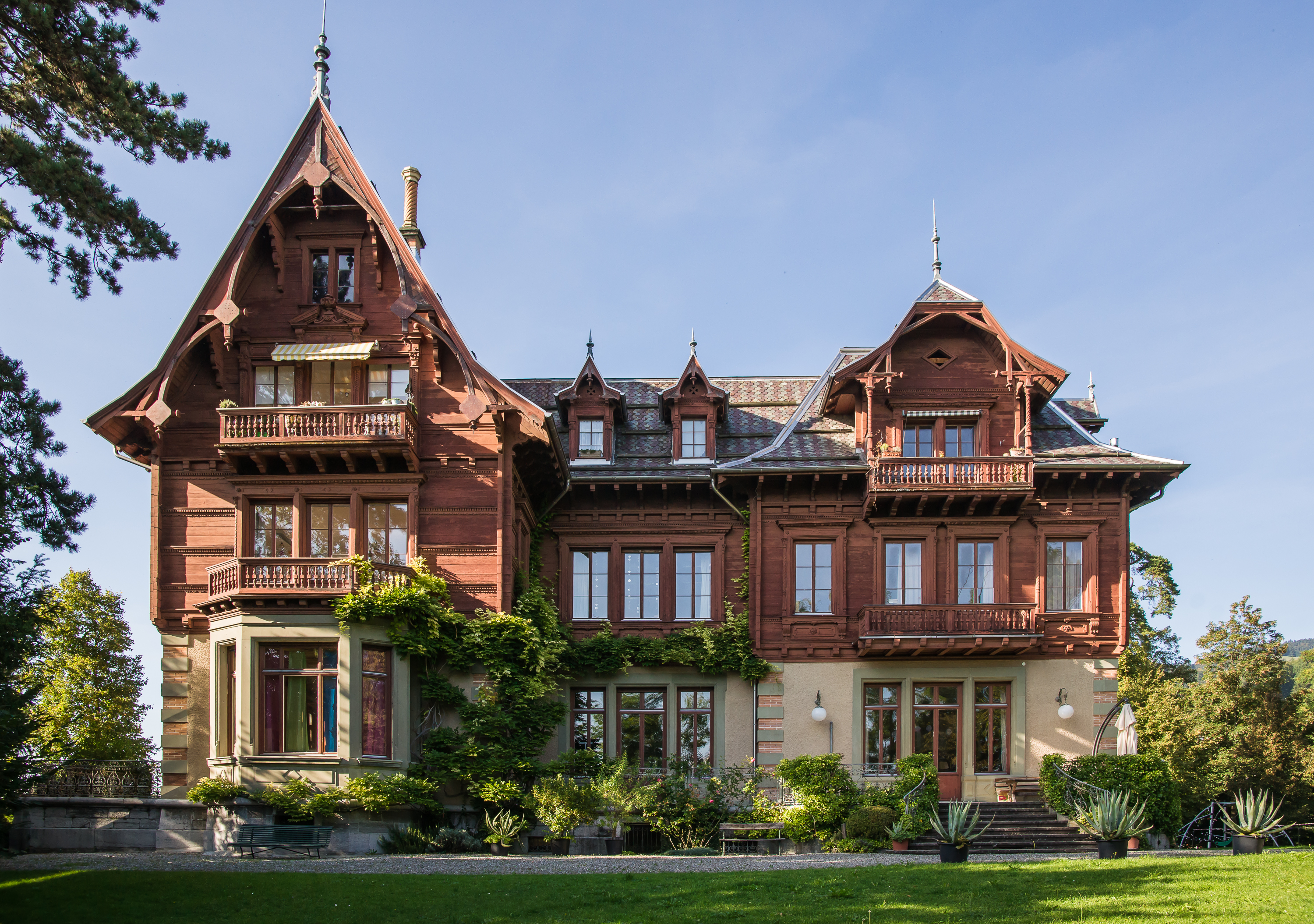 Landsitz Eichbühl, auch Schloss Eichbühl genannt, erbaut 1870, seit 1942 als Schulhaus benützt